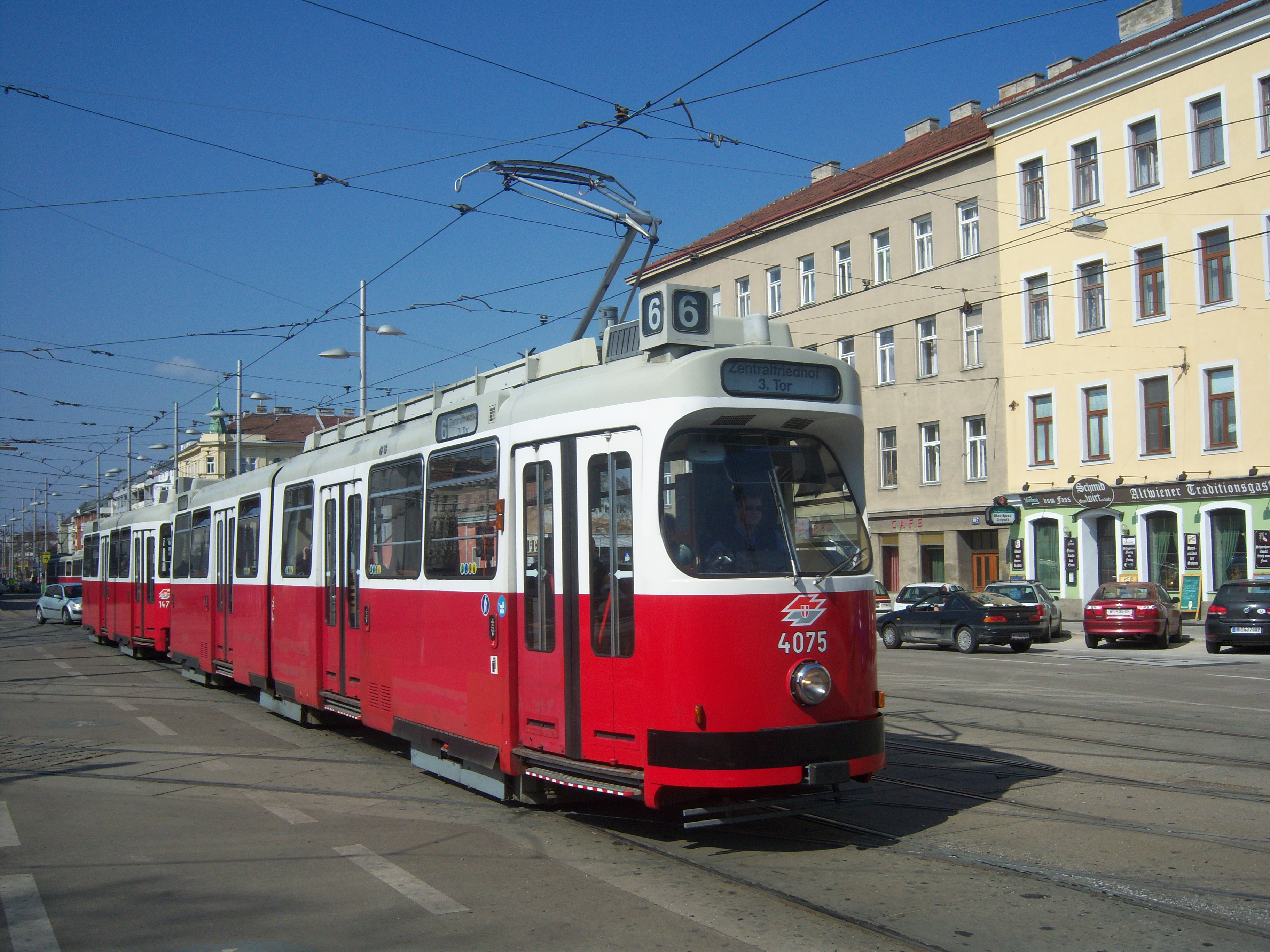 Linie 6 nächst Betriebsbahnhof Simmering